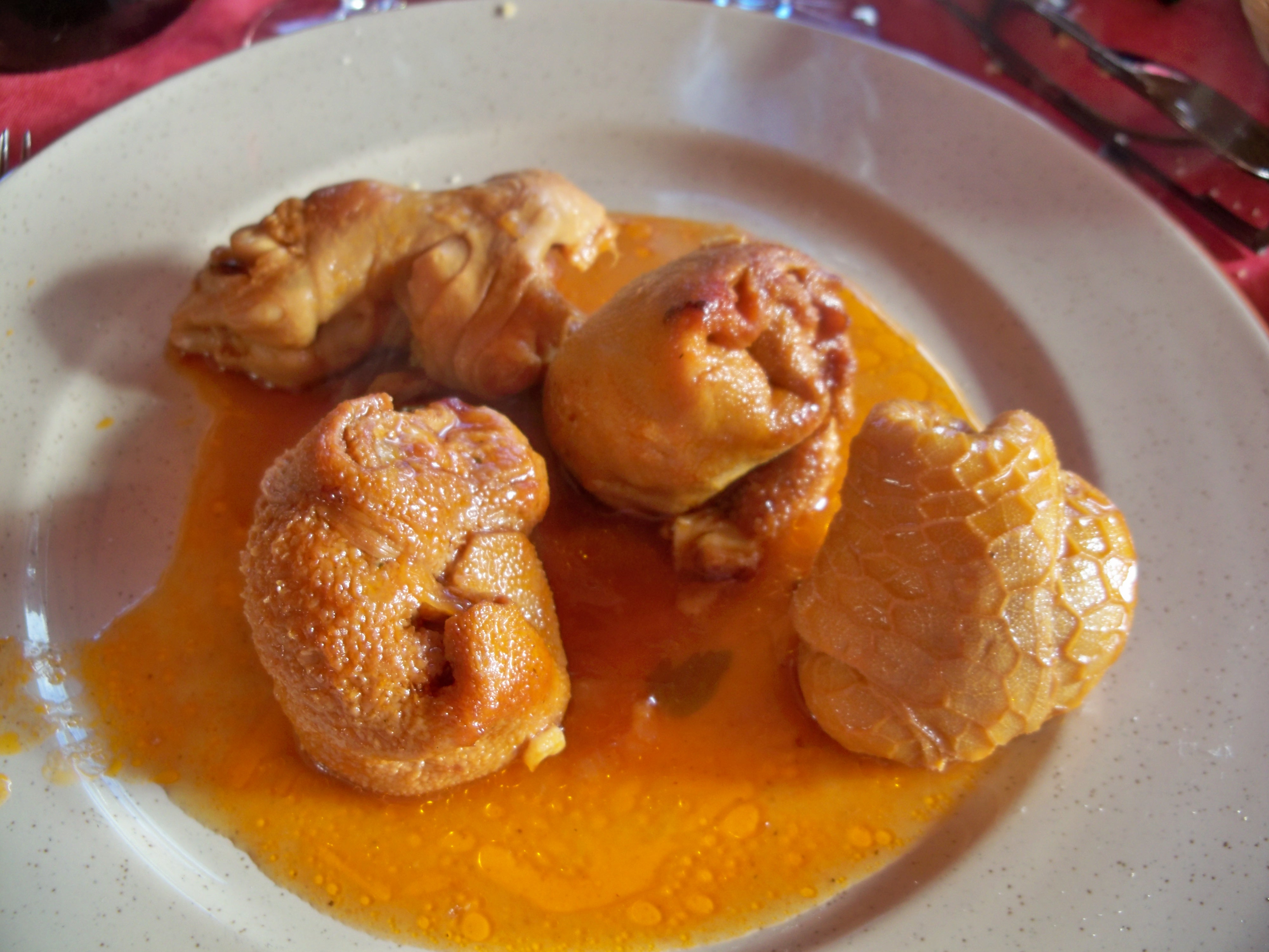 Défarde